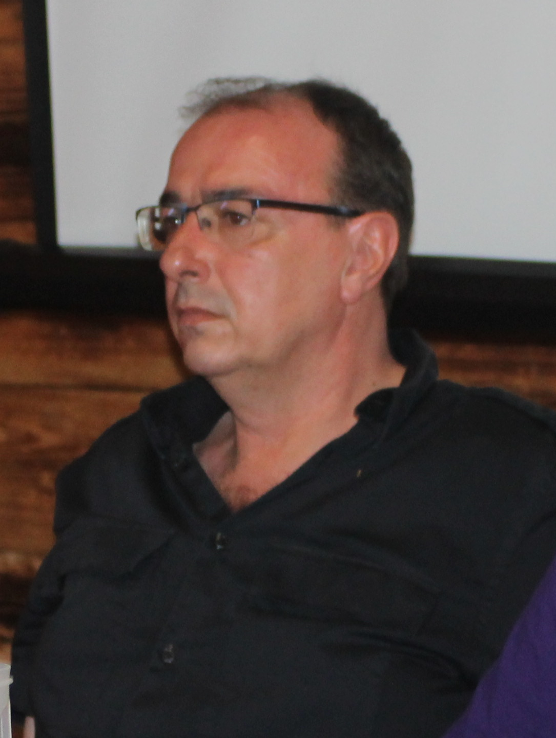 Universidad PCM 2019